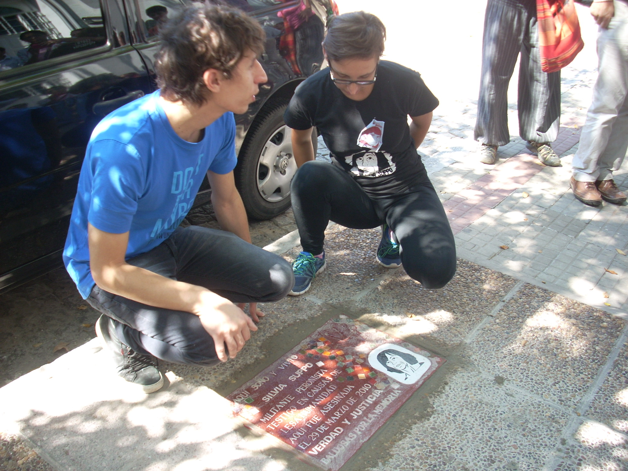 Colocacación de baldozón frente al local comercial donde Silvia Suppo fue asesinada, en Rafaela, Santa Fe, Argentina - 29-03-16